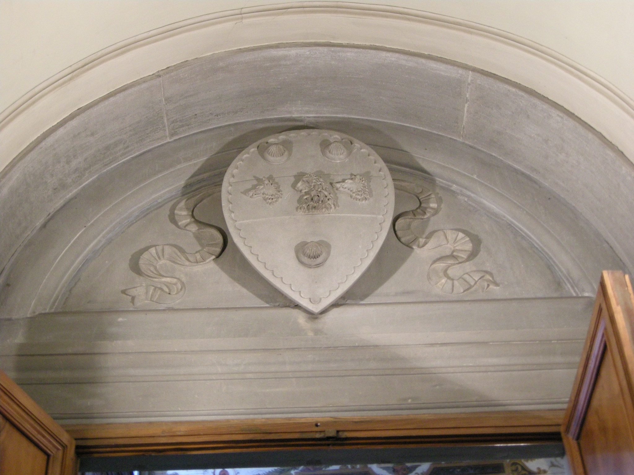 Palazzo temple leader, scala stemma temple leader